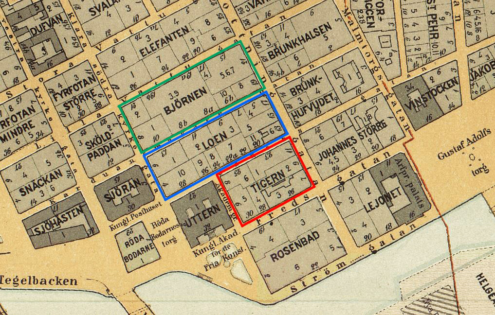 Kvarteren Tigern (röd), Loen (blå) och Björnen (grön) på nedre Norrmalm i Stockholm